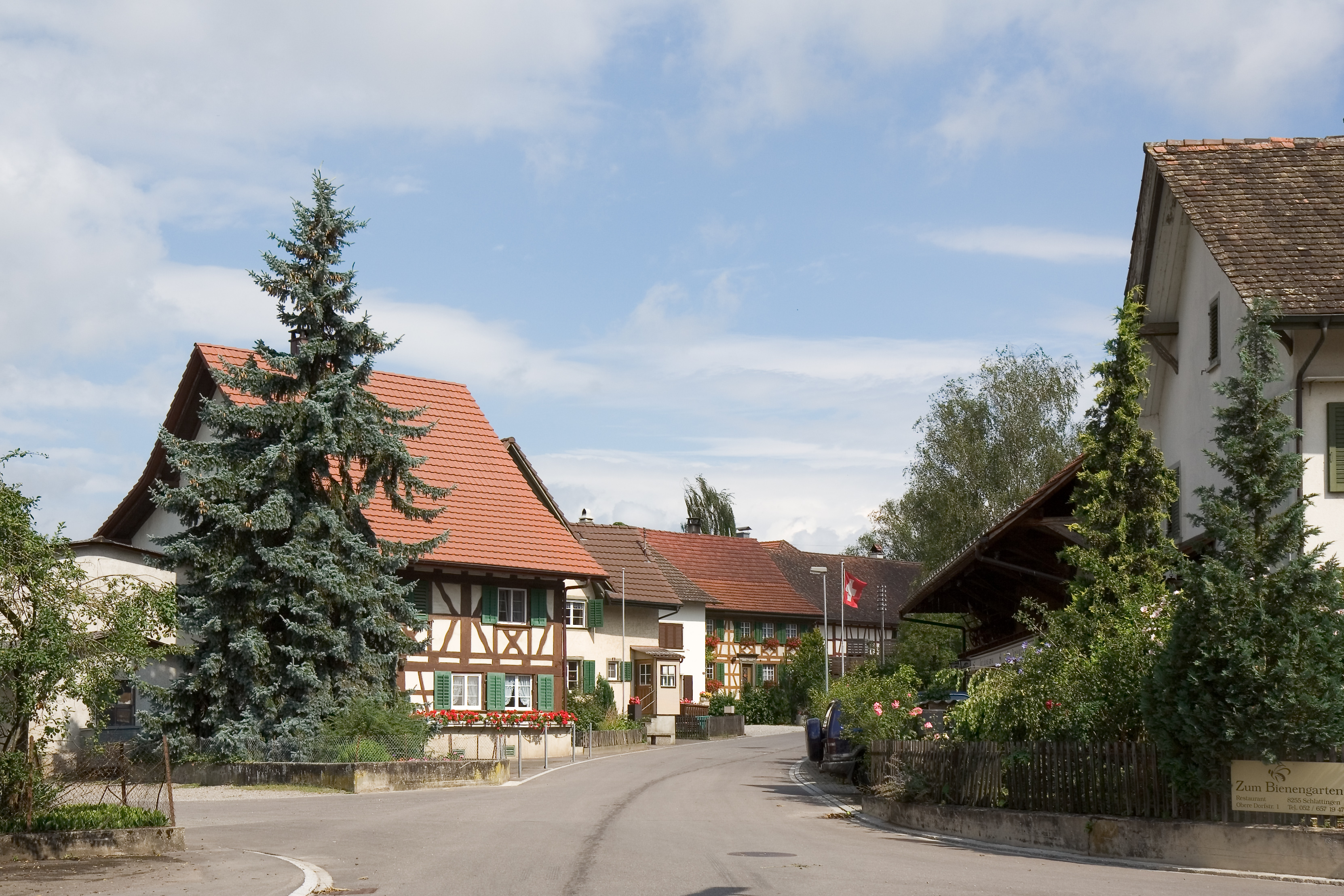 Ein Dorfweg in Schlattingen